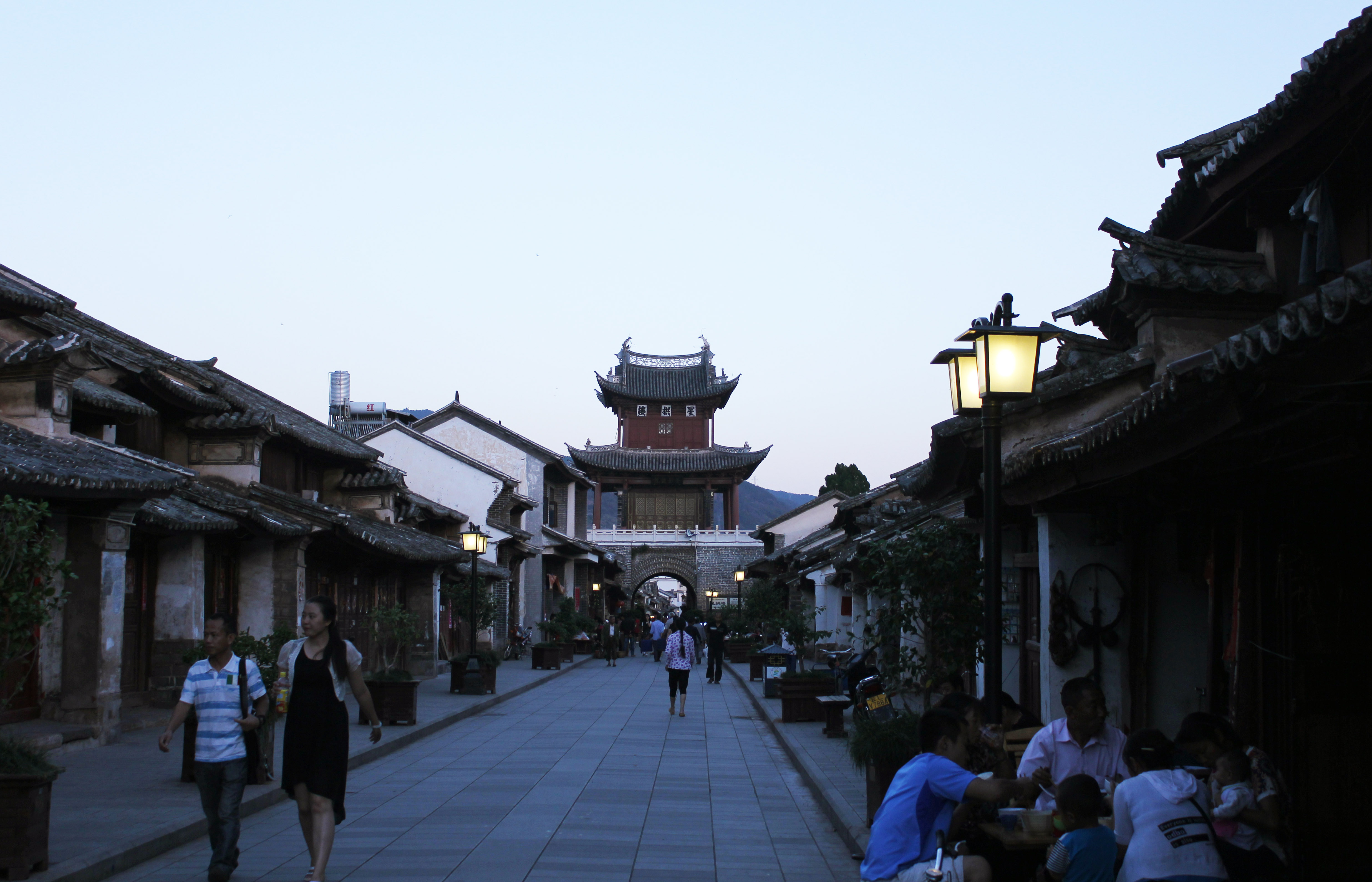 中国云南巍山古城北街和星拱楼